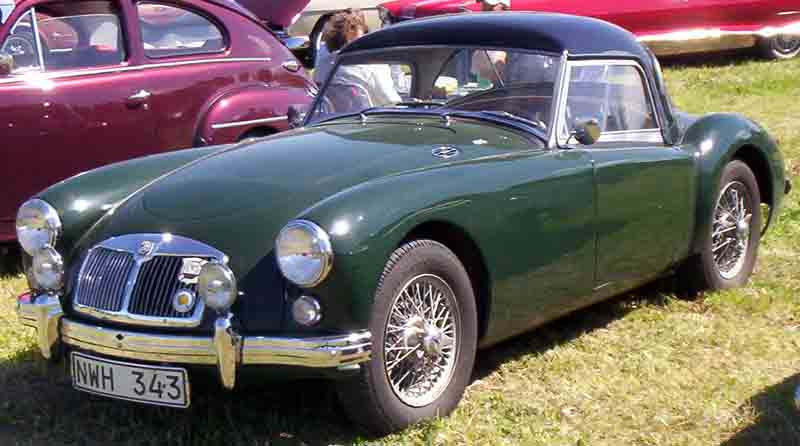 M.G. MGA 1957